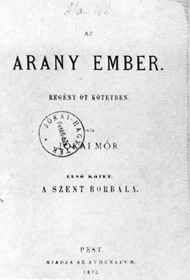 Az arany ember c. Jókai-regény borítója